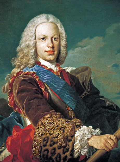 Retrato del rey Fernando VI de España (1713-1759), que fue hijo del rey Felipe V de España y de la reina María Luisa Gabriela de Saboya.